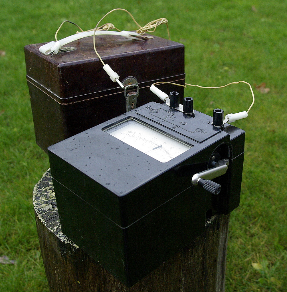 Meger M4100/4 komplekt